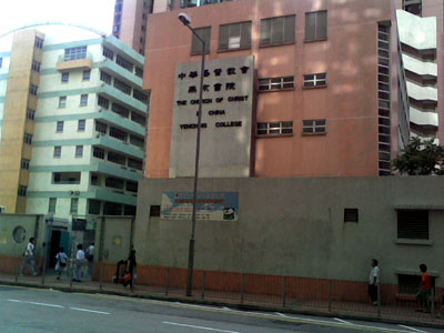 燕京書院CCC Yenching College